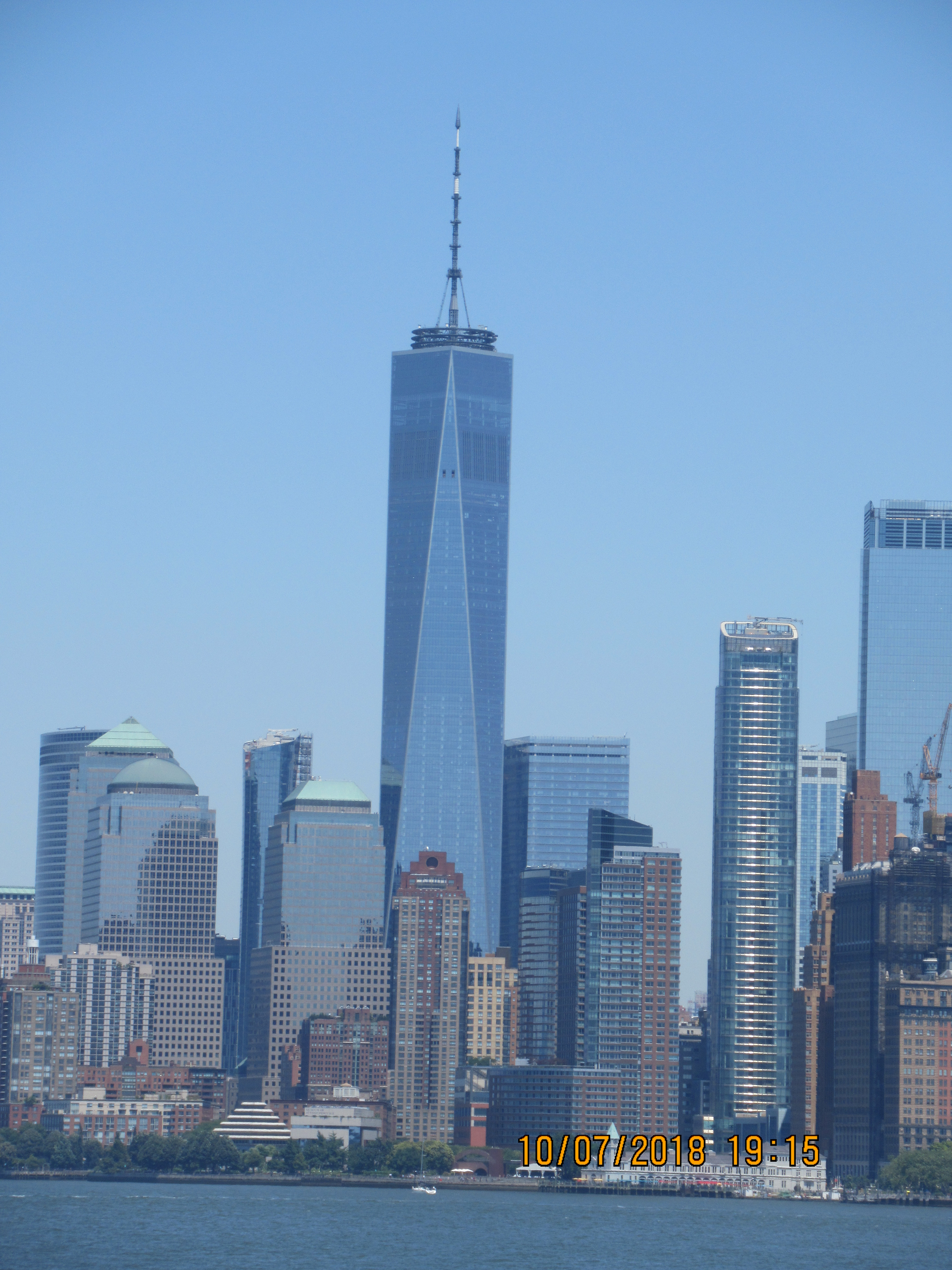 One Wold Trade Center am 10.07.2018.